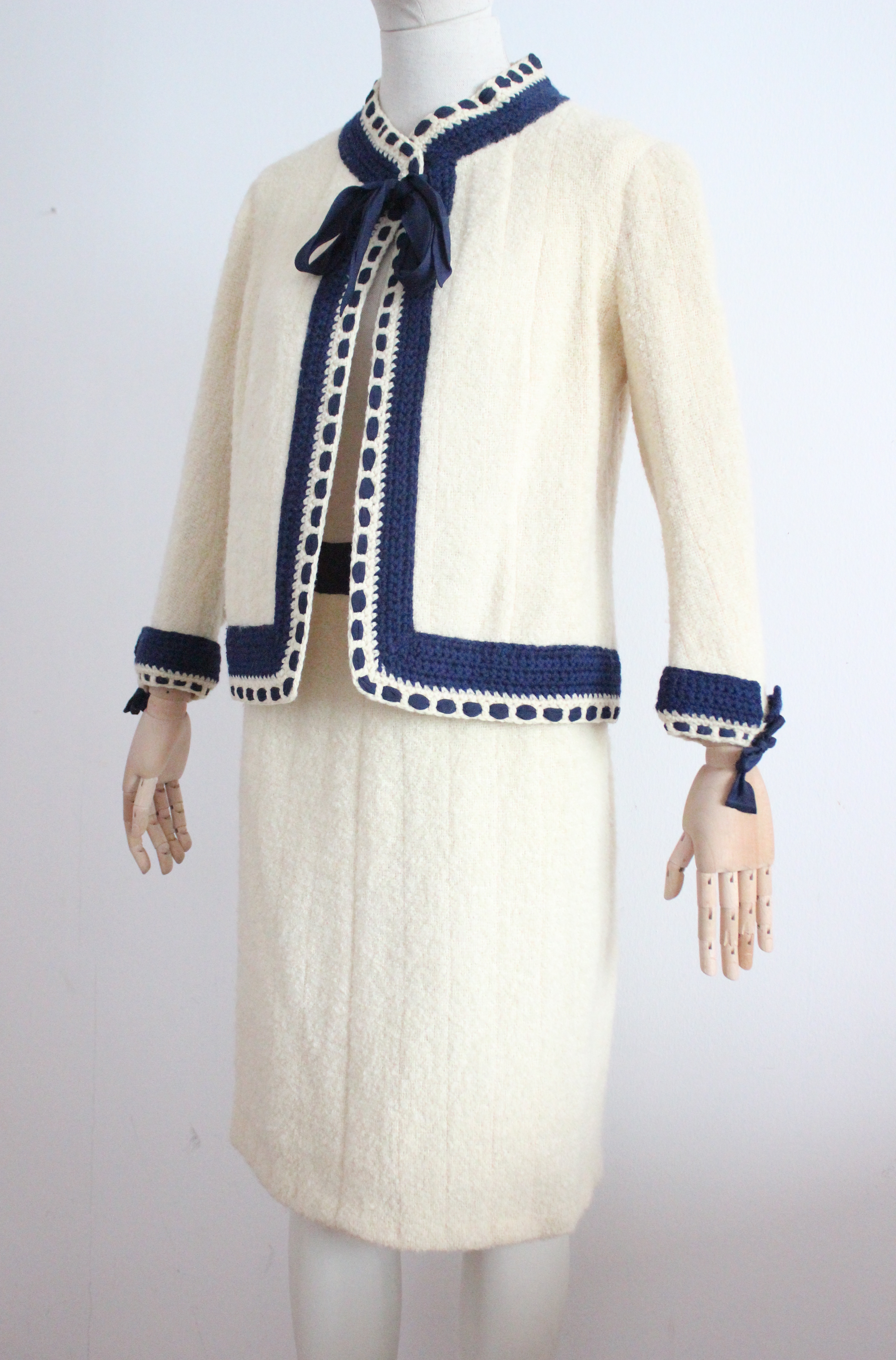 Chanel tarafından 1965 yılında üretilmiş haute couture etek-ceket takım. Adnan Ege Kutay Koleksiyonu